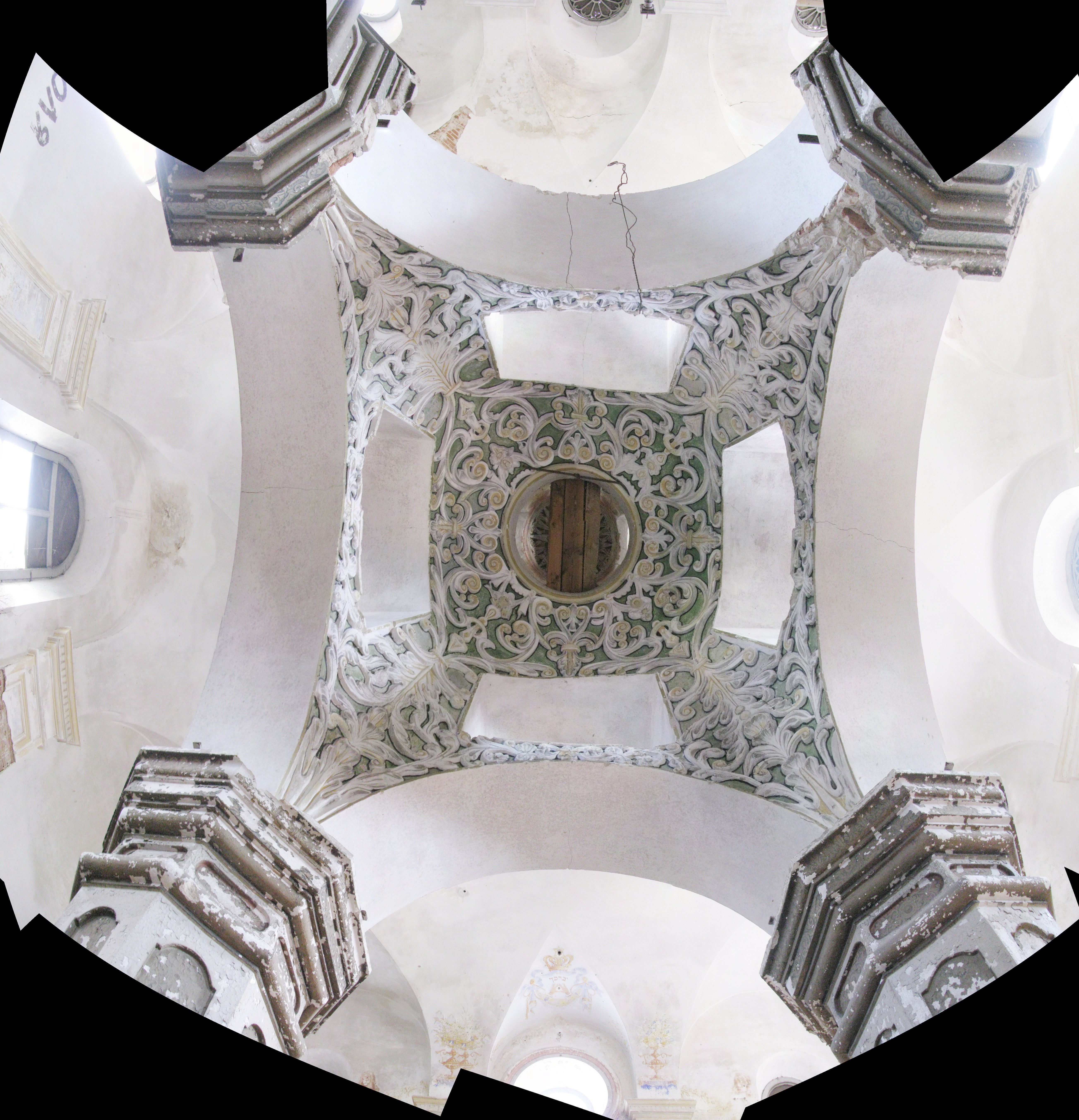 Беларуская (тарашкевіца): Будынак былой сынагогідэкаратыўнае аздабленьне:фрэскавыя кампазыцыі, арнамэнтальная лепка. г. Слонім This is a photo of Belarusian heritage monument. Reference number: 412Г000509 ( WLM)